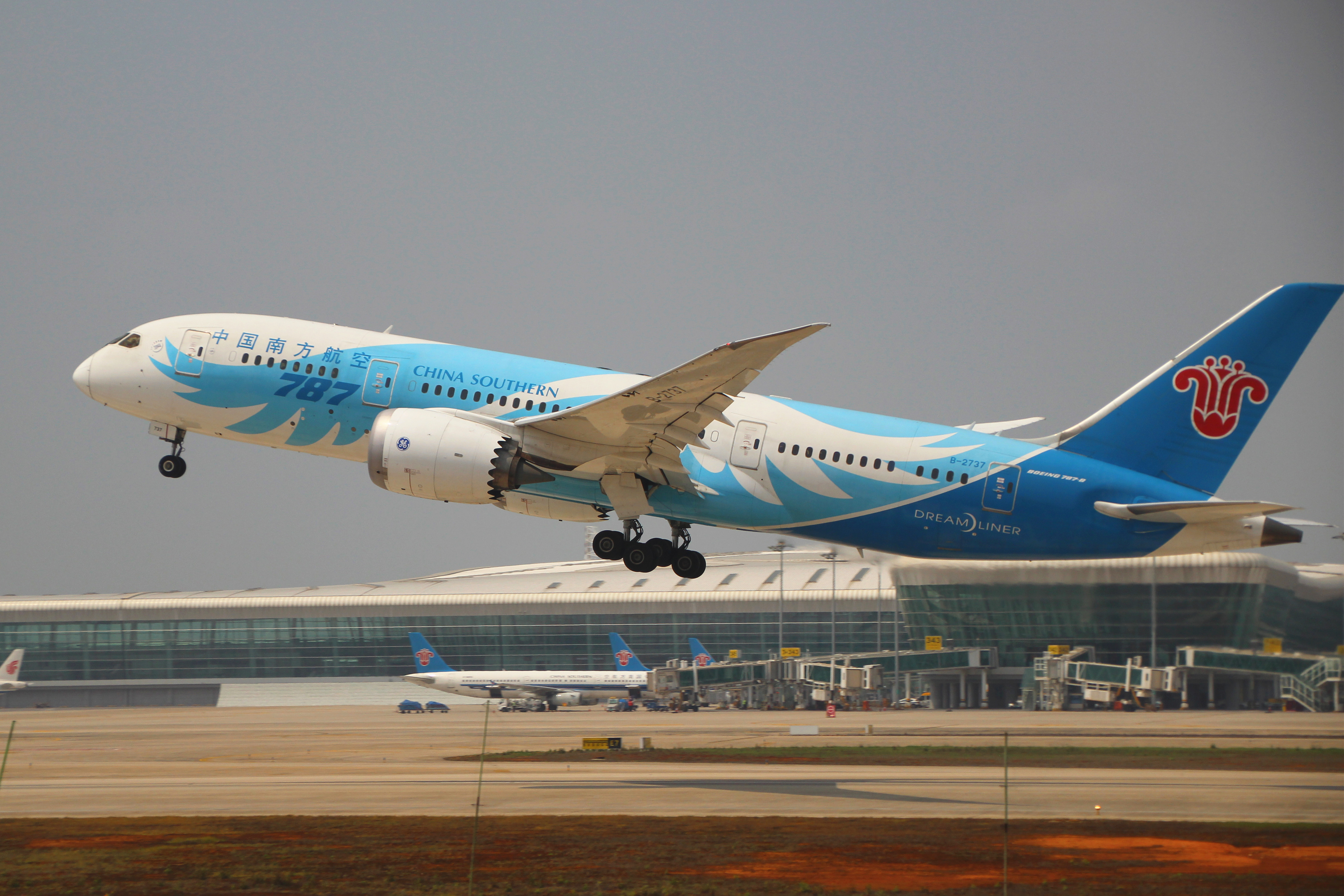 中文（中国大陆）: 即将从武汉天河机场飞往北京首都机场的波音787客机